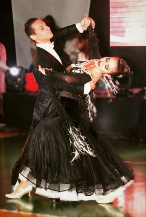 Фокстрот